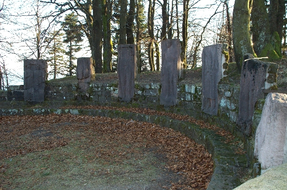 Cette place est certainement la place de regroupement des fidèles